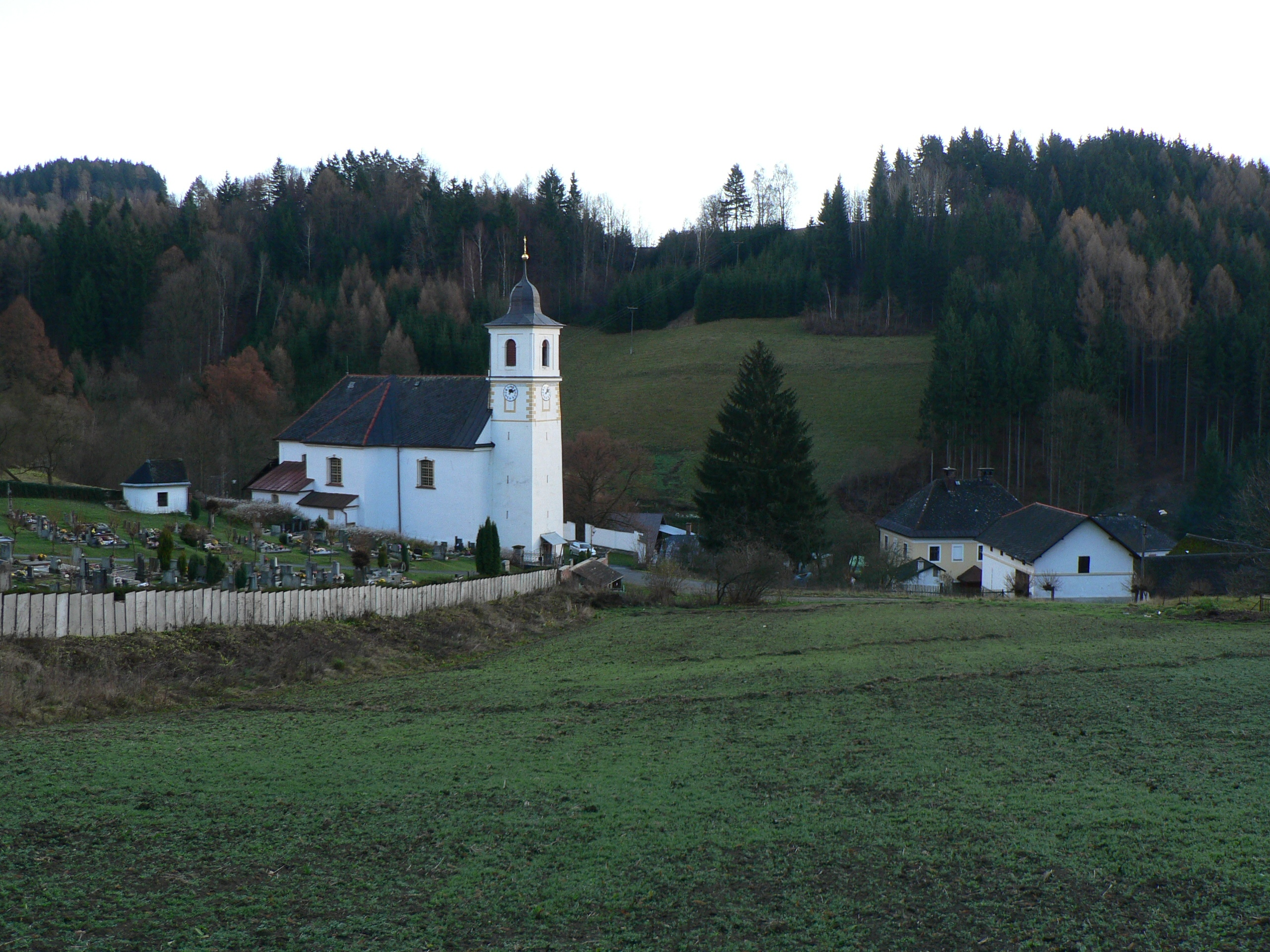 Hanušovice u kostela